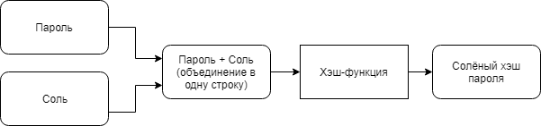 Принципиальная схема использования соли при хэшировании паролей